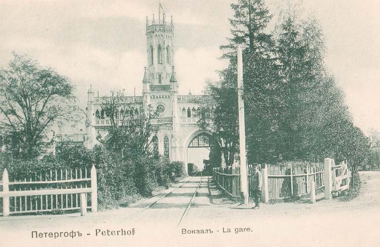 Вокзал Петергофа, дореволюционное фото. Ныне это вокзал станции Новый Петергоф